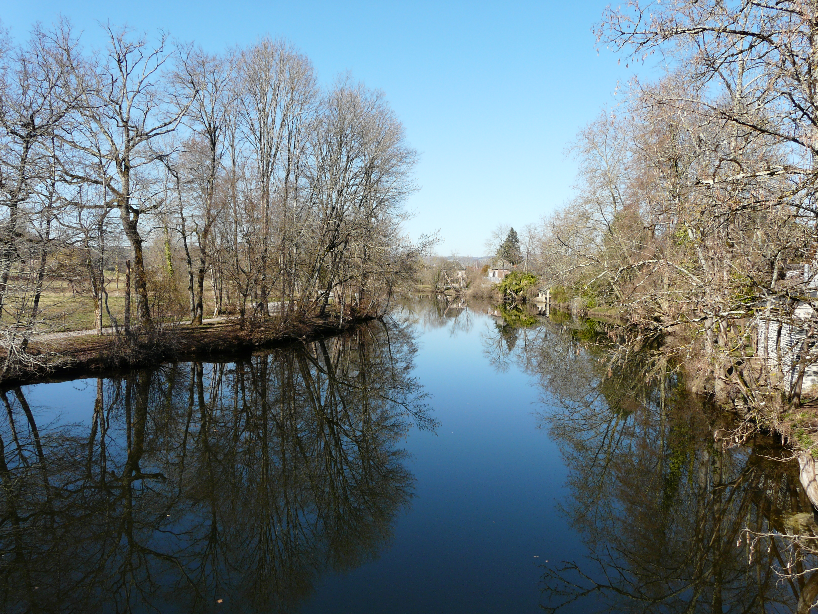 La Vézère en amont du pont du XIXe siècle à Saint-Viance, Corrèze, France.